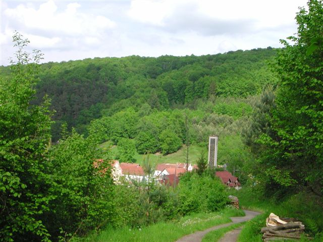 vue de Hanviller